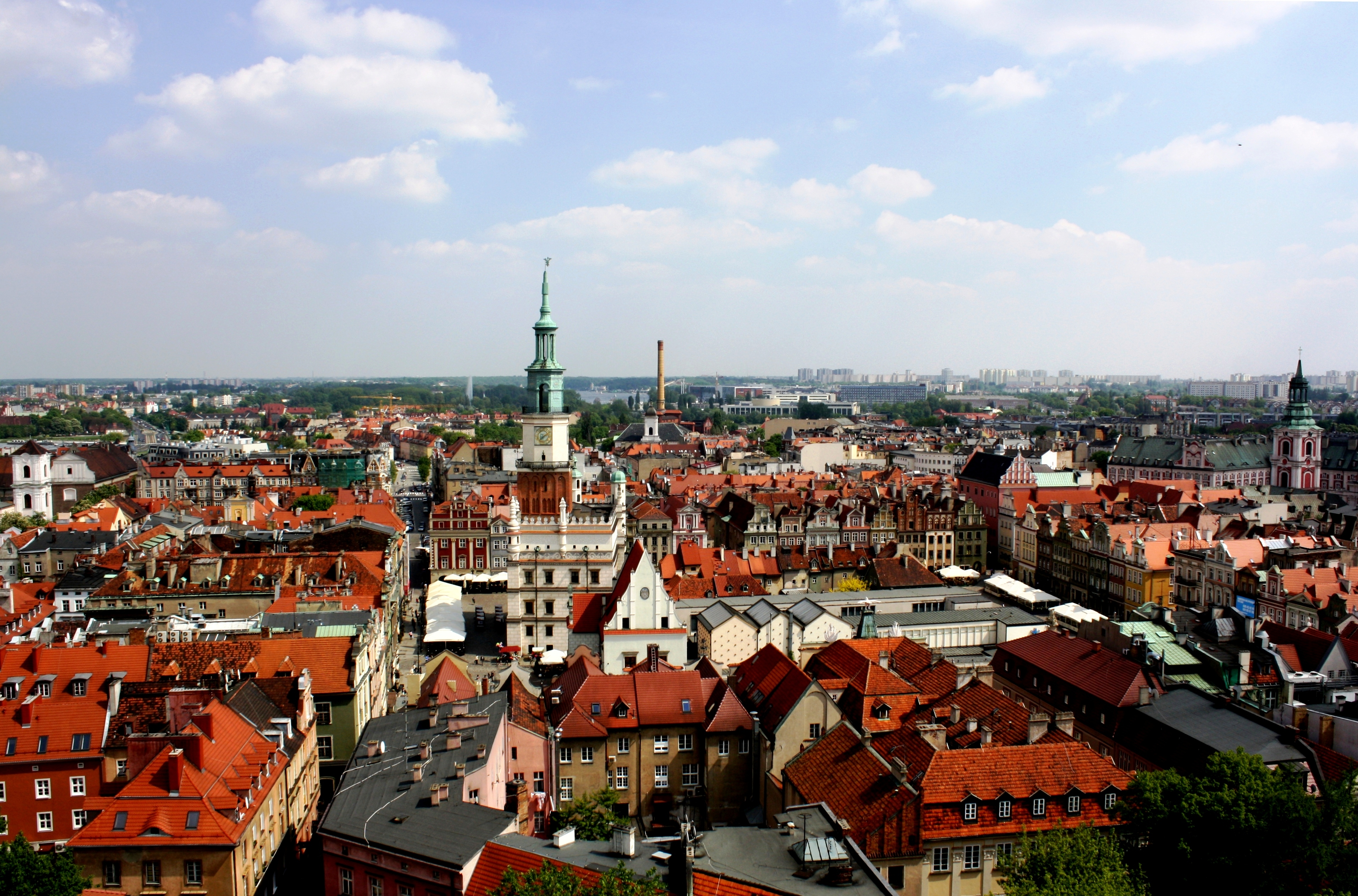 Zespół urbanistyczno-architektoniczny Starego Miasta z budynkami użyteczności publicznej, sakralnymi oraz kamienicami mieszczańskimi STARE MIASTO w obrębie ulic: Garbary, Podgórnej, Al. Marcinkowskiego, Solnej, Małe Garbary, Miasto Poznań